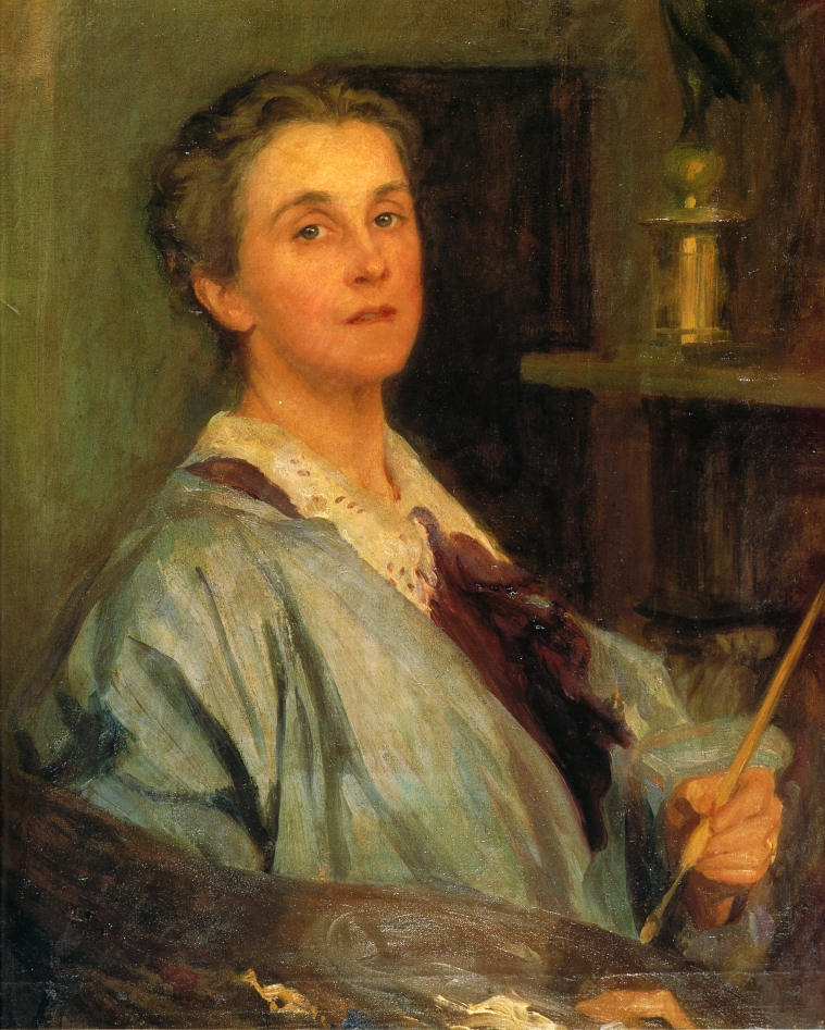 Self-portrait.